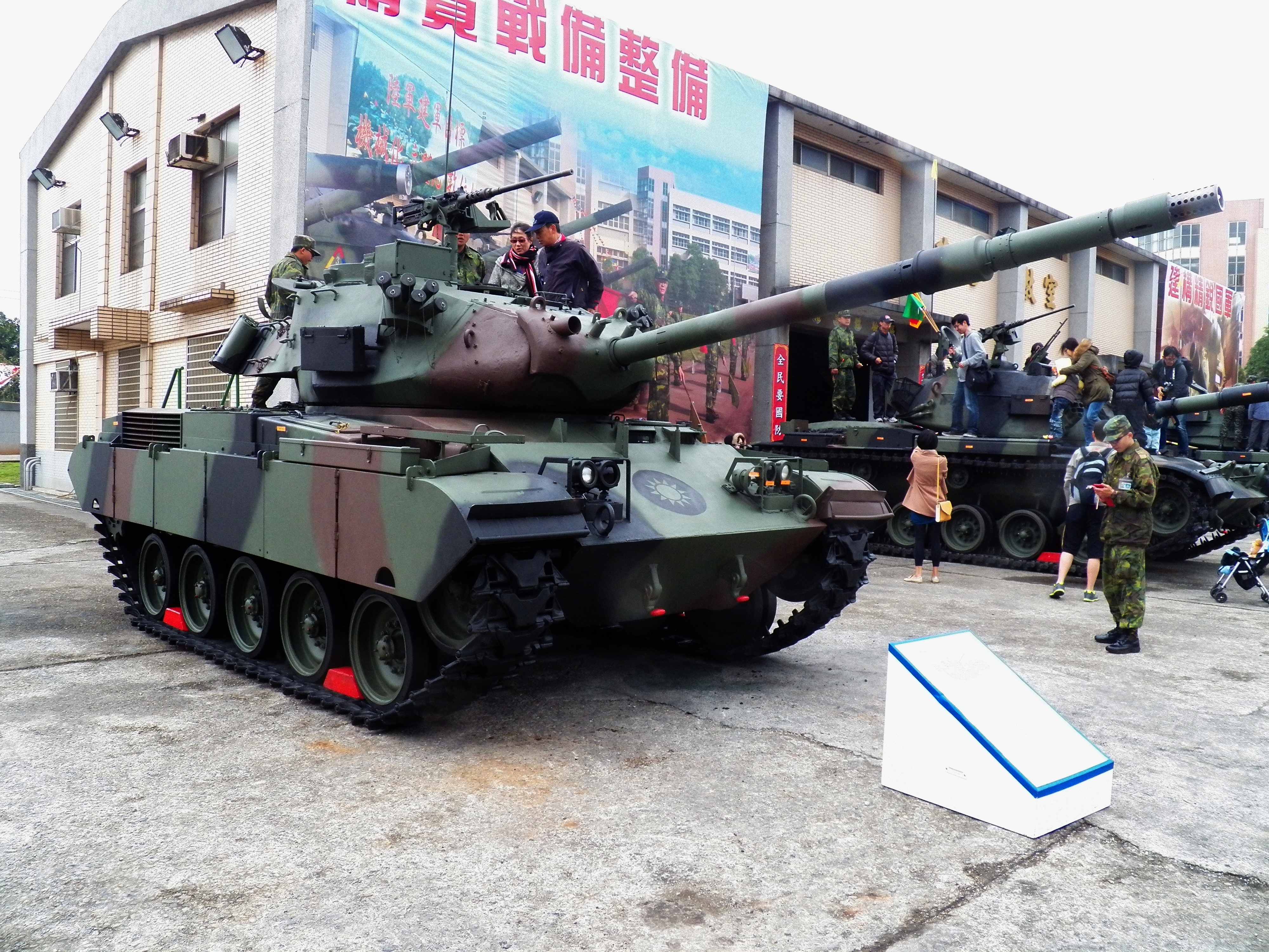 2013年裝甲兵學校營區開放活動，砲塔教室前展示的M41D輕戰車。